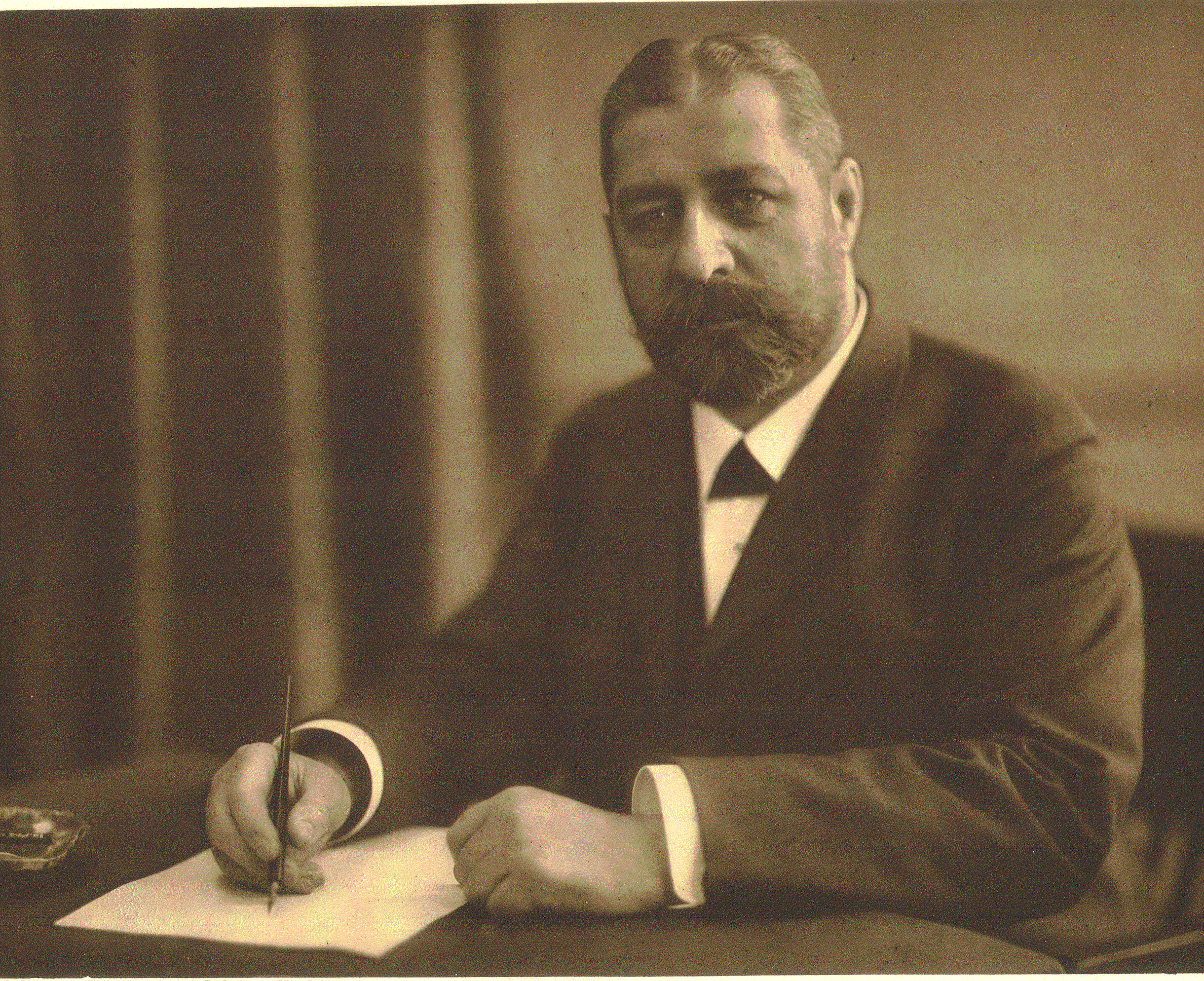 Friedrich Adolf Döhner (1847-1922), hamburgischer Kaufmann, MdHB